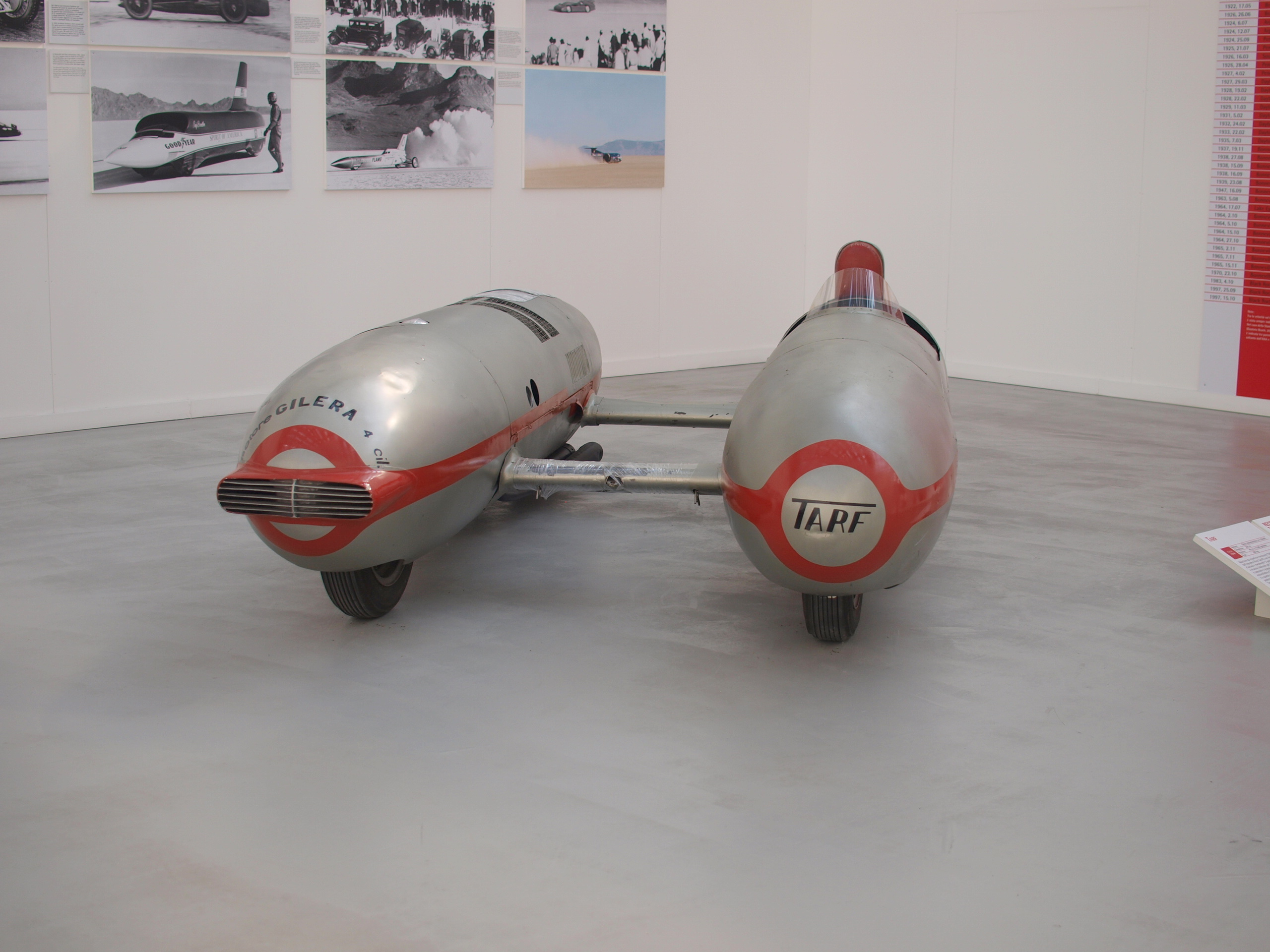 BISILURO TARF I Gilera 1956 L'evoluzione dell'automobile